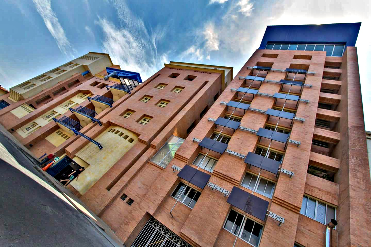 Infraestructura